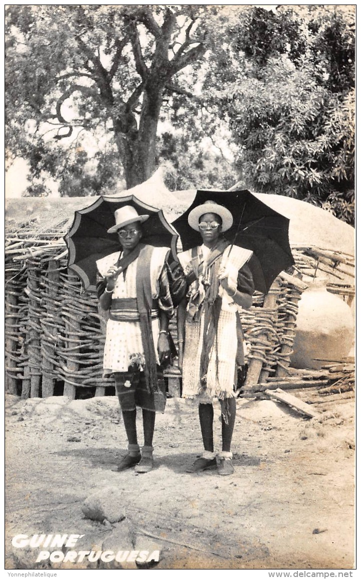 Postcard: GUINEE PORTUGAISE / Blufos Balantas em gala de Fanado